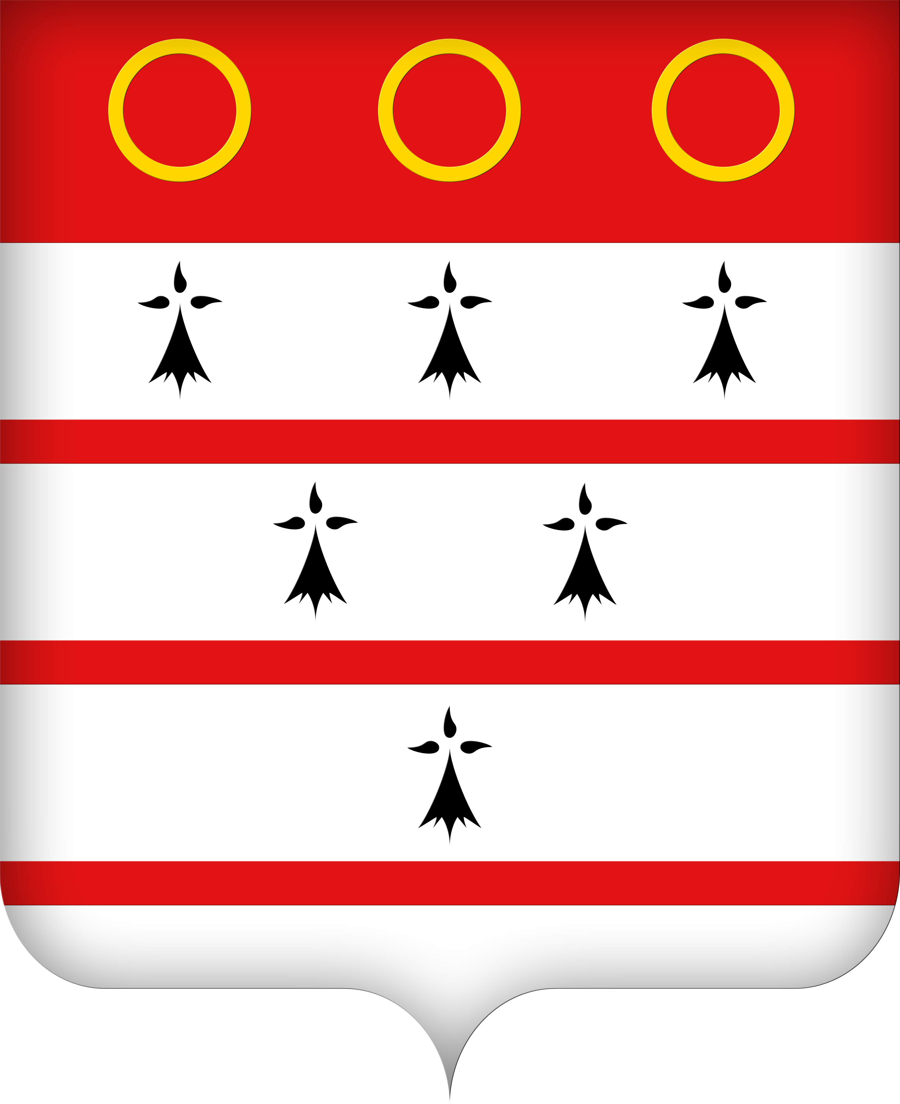 Armes des comtes de Gourcy : "Chef de gueules chargé de 3 annelets d'or, d'argent à six hermines de sable posées 3, 2, 1."